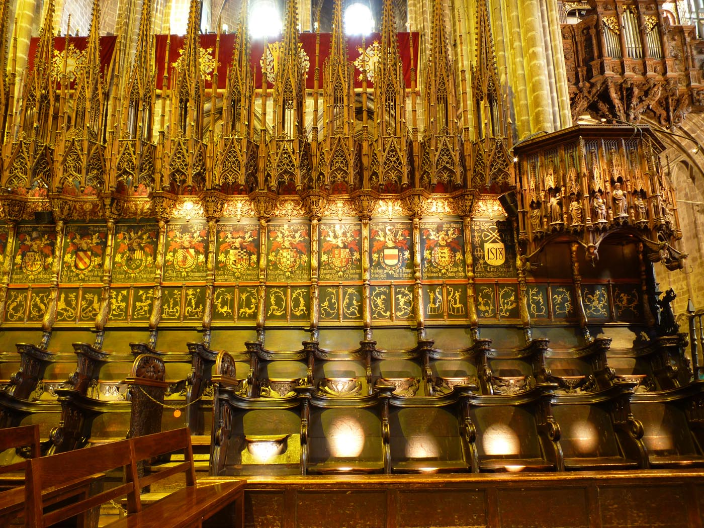 Coro de la Catedral de Barcelona.